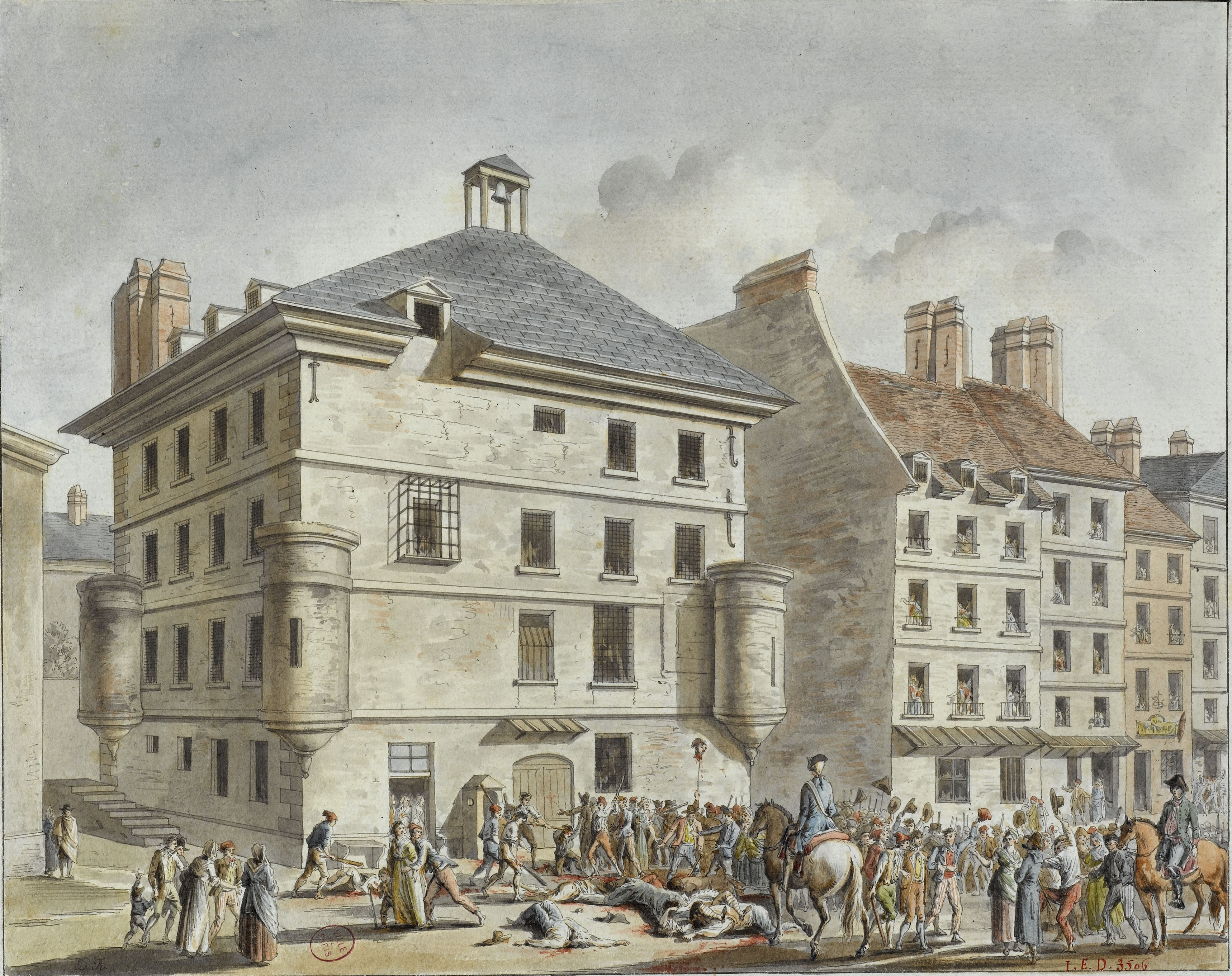 Représentation des massacres commis à la prison de l'Abbaye du 2 au 7 septembre 1792. Plusieurs cadavres sont amassés devant la prison sous les yeux de la foule tandis que des sans-culottes brandissent une tête au bout d'une pique.